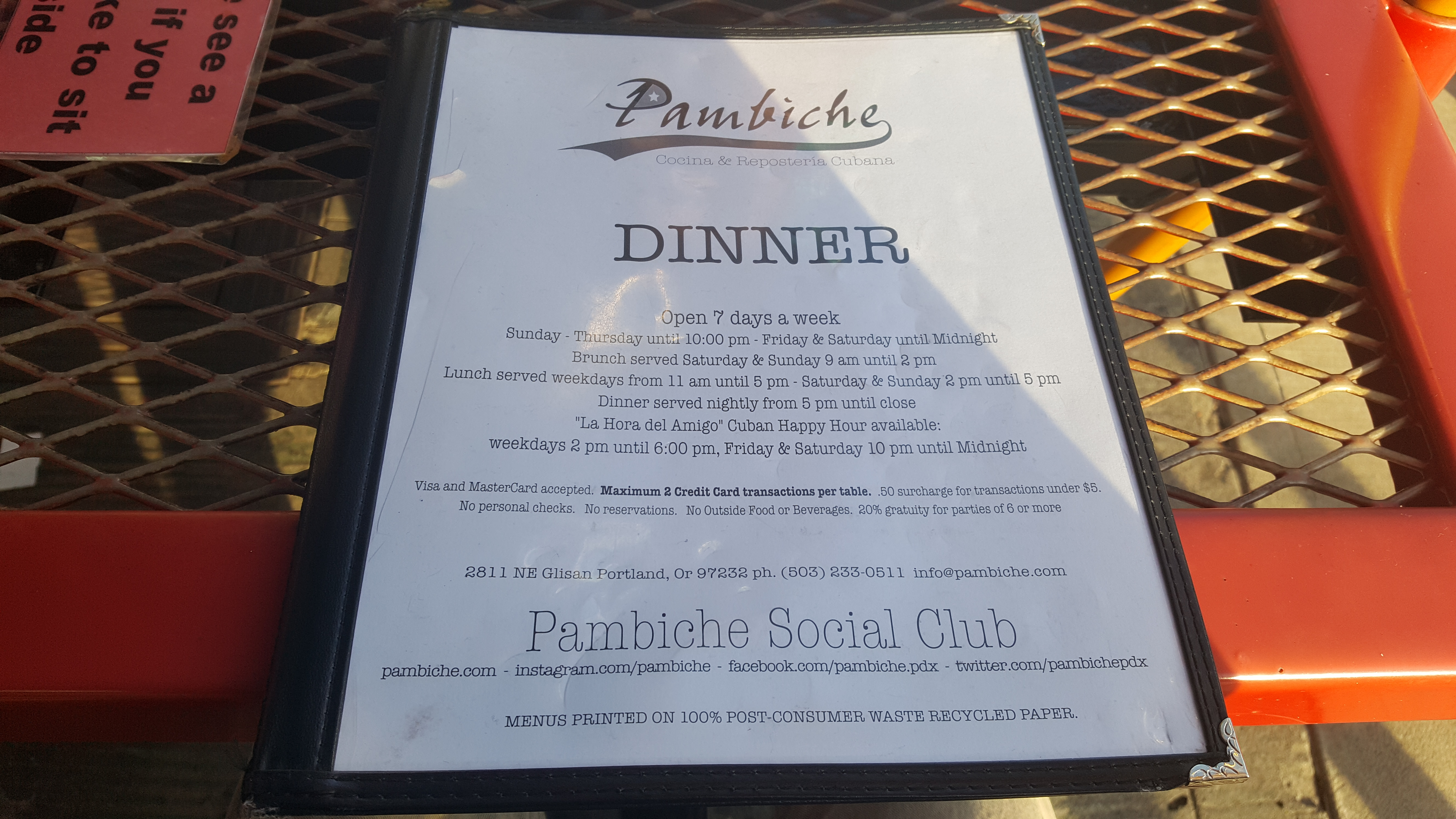 Pambiche